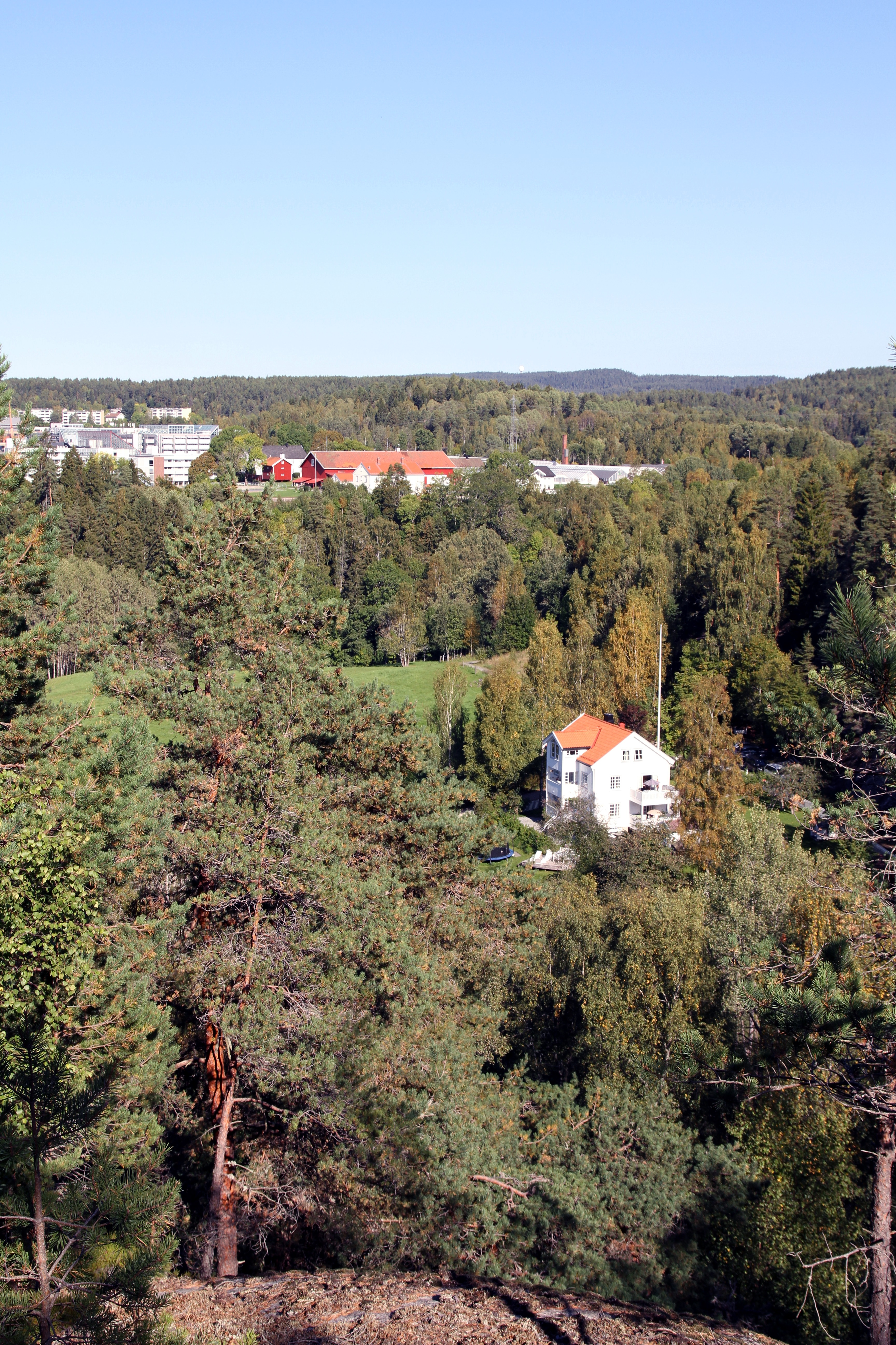 Skullerud sett fra Midtåsen. Bygningen nærmest kamera er plassen Smeden, Smedveien 7.